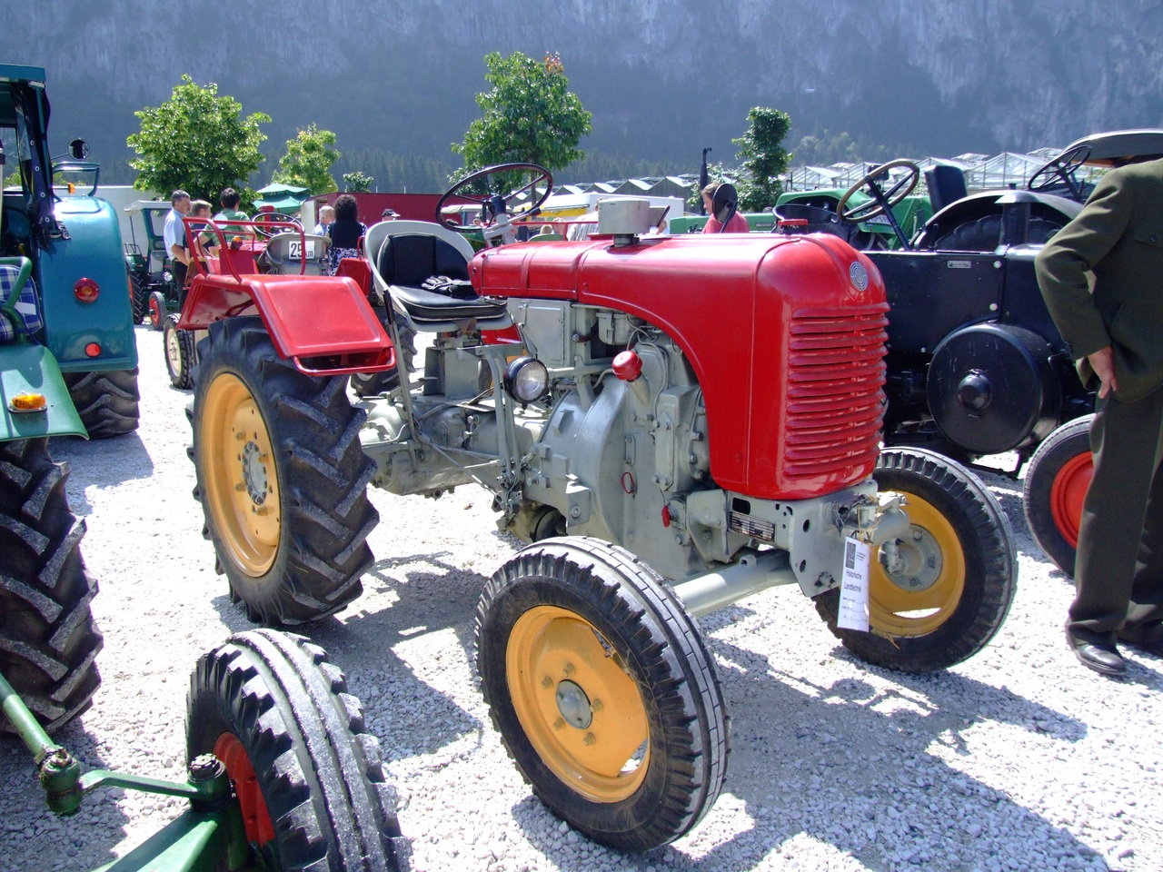 Steyr-Schlepper T84E mit 18 PS, Baumuster Reihe: T84a, Baujahr: 1959, Hubraum: 1330 ccm, Nutzlast: 700 kg, Eigengewicht: 1220 kg, zul. Gesamtgewicht: 1920 kg